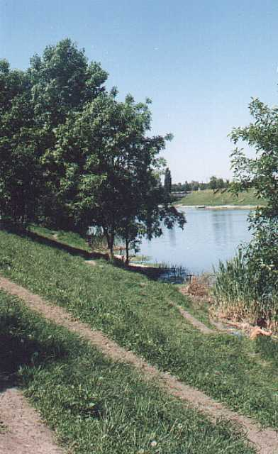 uk:?????????:??????????